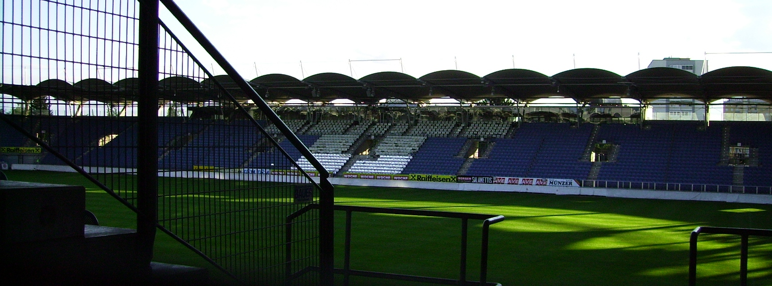 Westtribüne mit VIP-Bereich der UPC-Arena